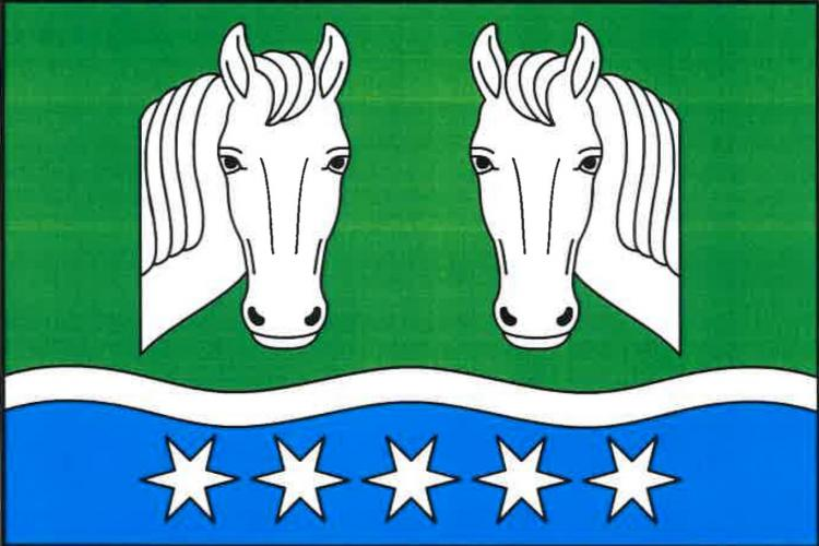 Stáj, okres Jihlava, vlajka